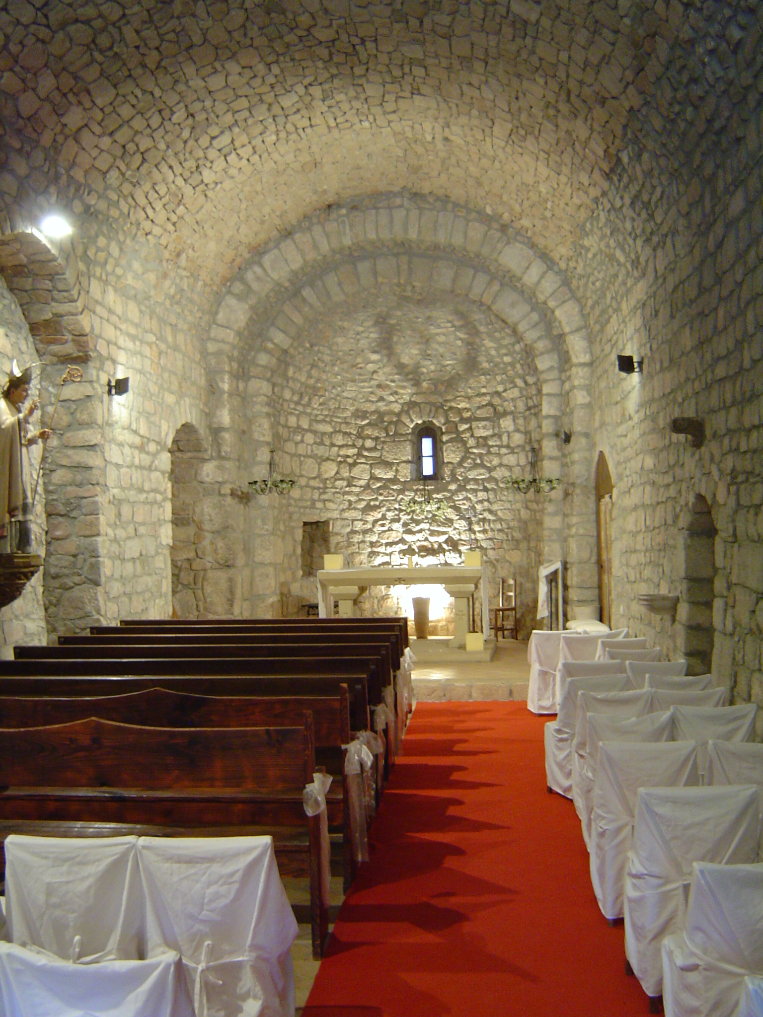 Interior de l'església de Sant Marçal de Montseny.